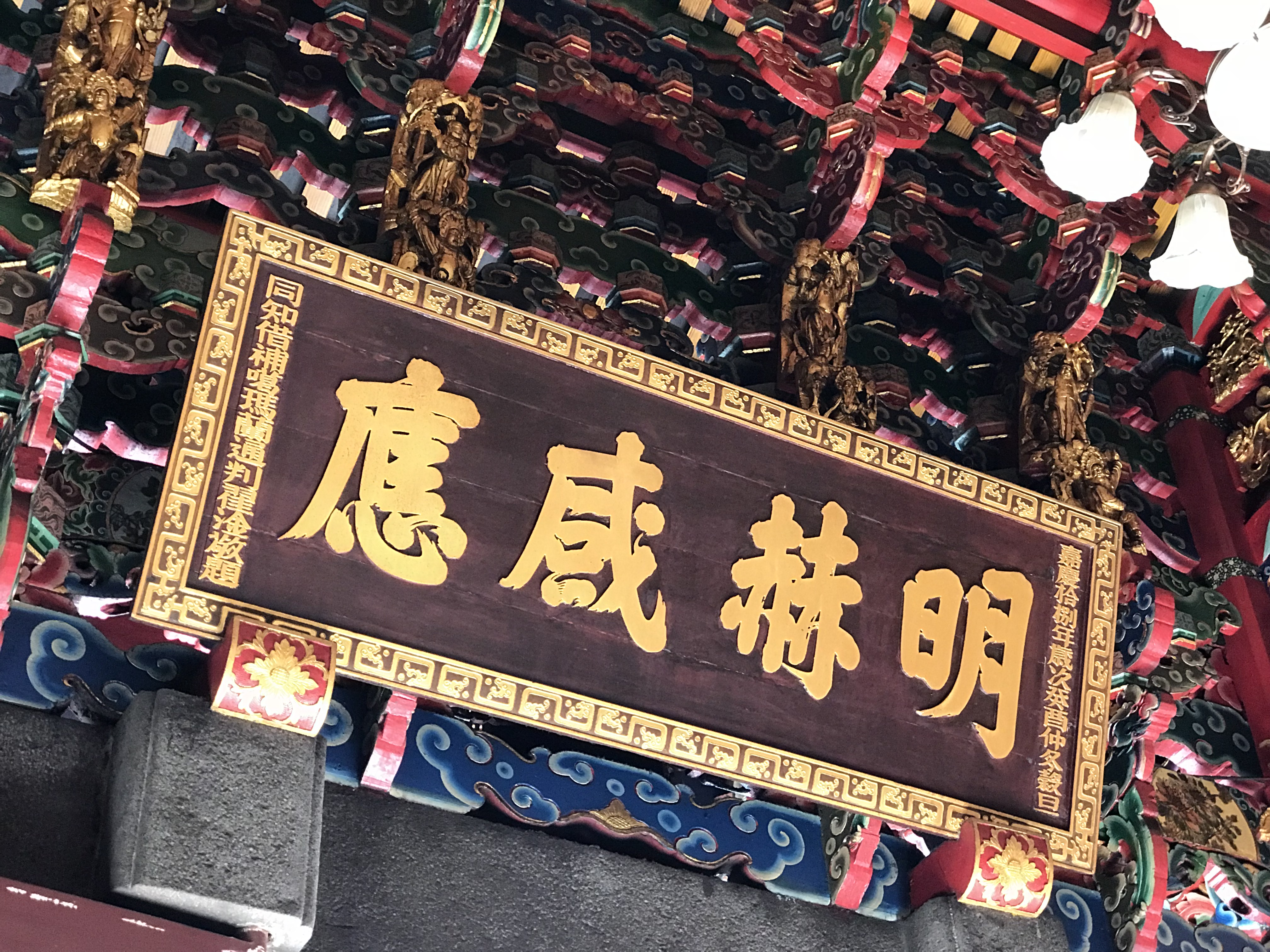 中文（台灣）: 桃園景福宮匾額